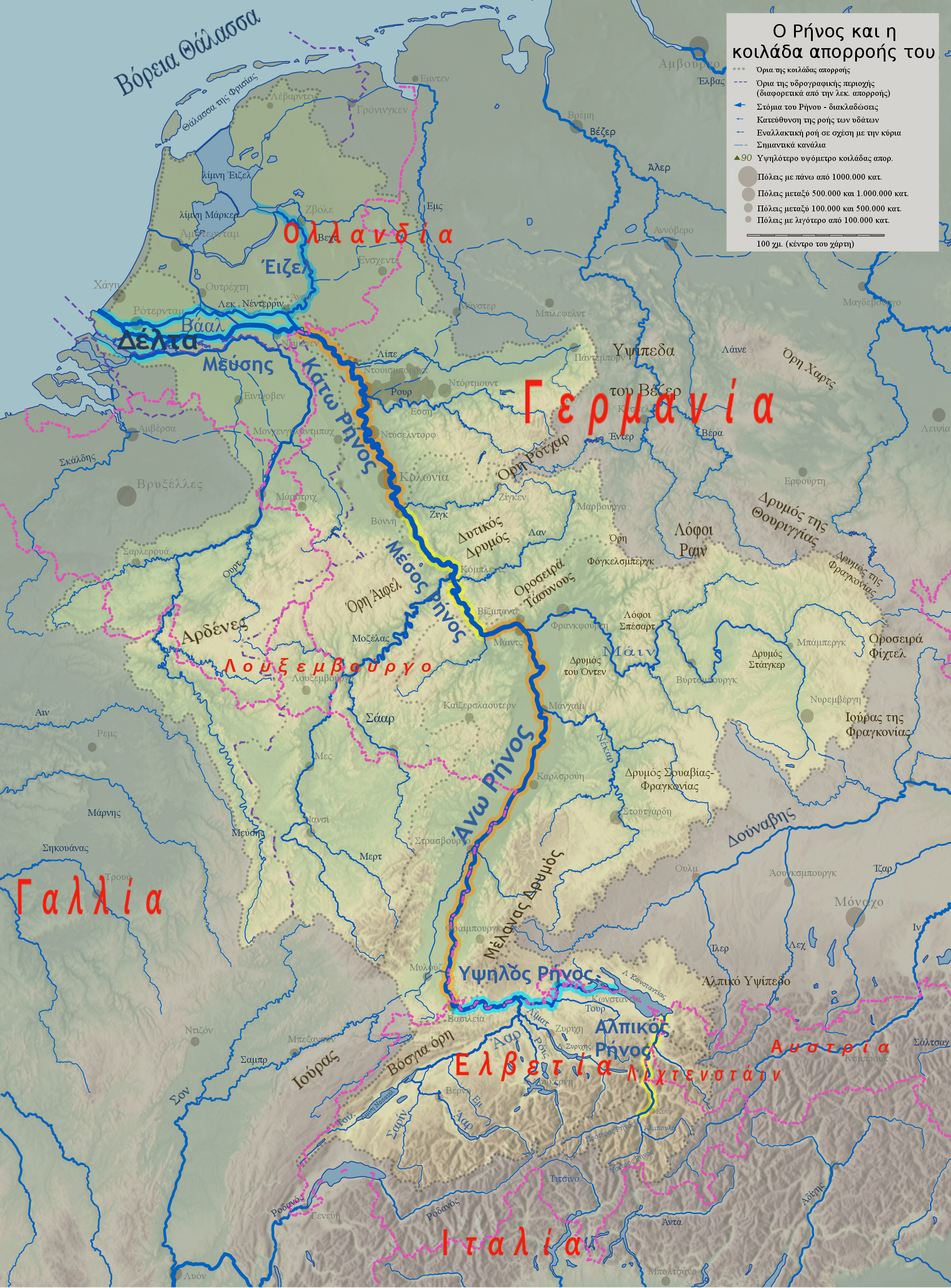 Η λεκάνη απορροής του Ρήνου βάσει του File:Rheinsystem_blanco.jpg